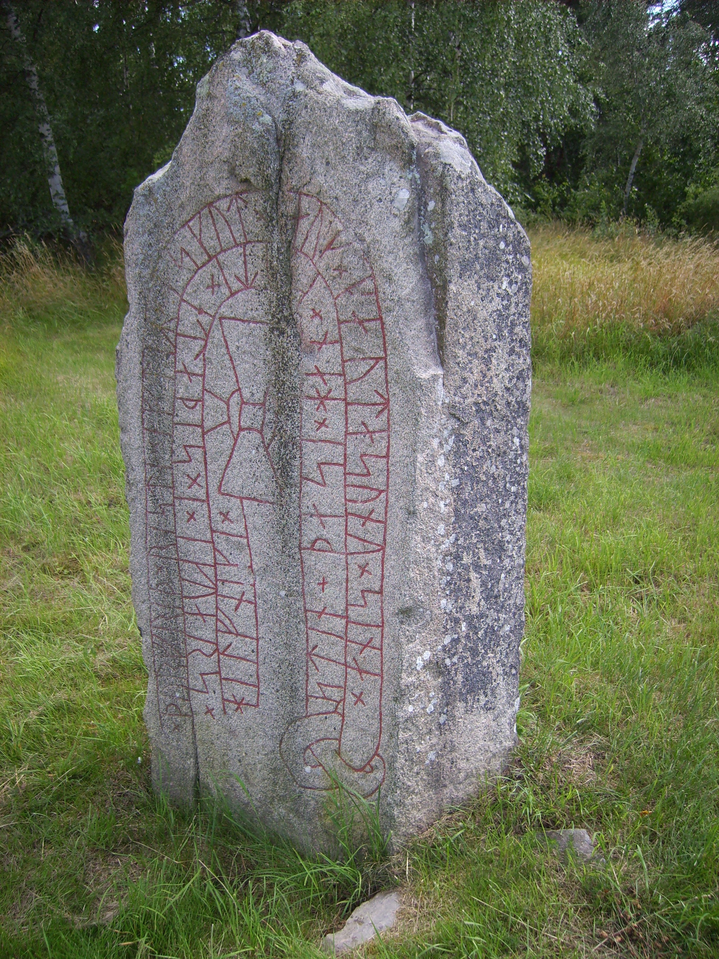 Bjällbrunna. Runestone Ög 155. Sweden.The text in modern